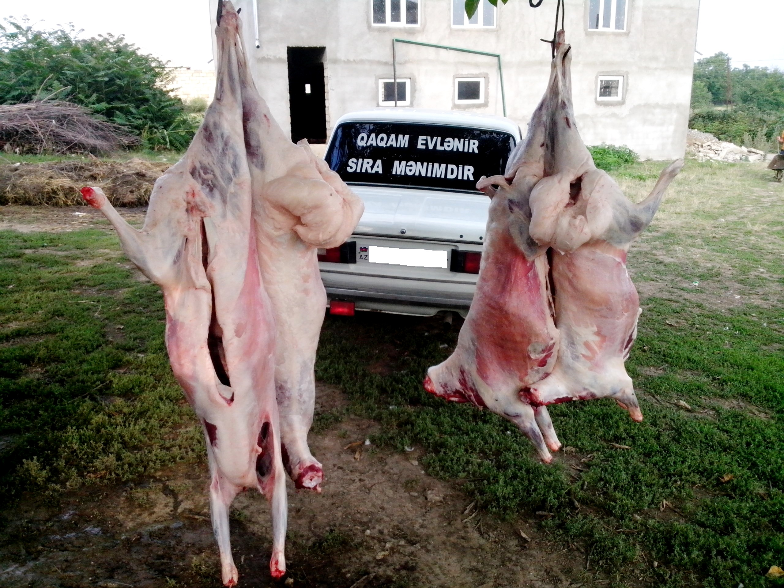 Cekli toyu üçün heyvan kəsimi, Quba, 11 avqust 2013